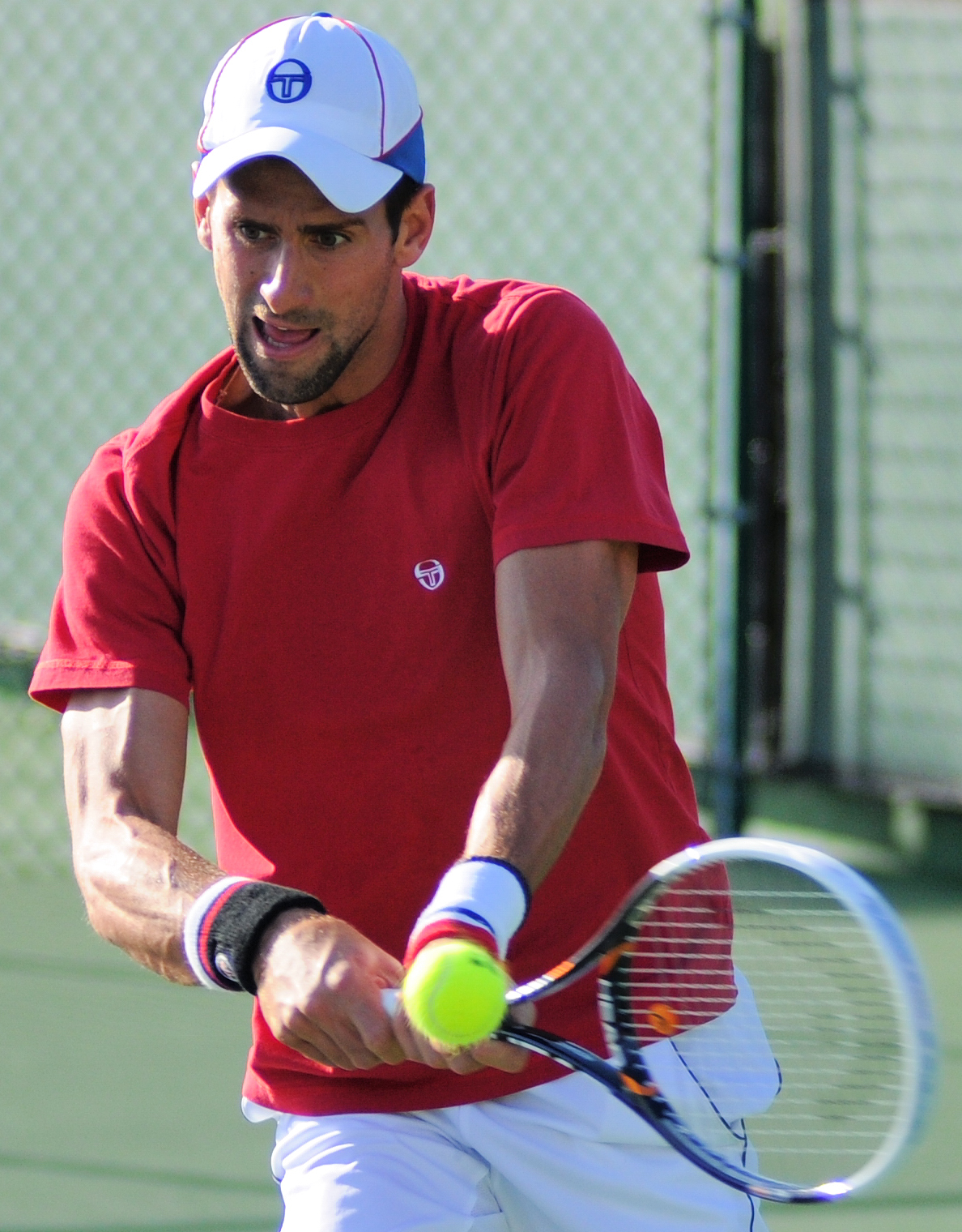 BNP Paribas Open 2012